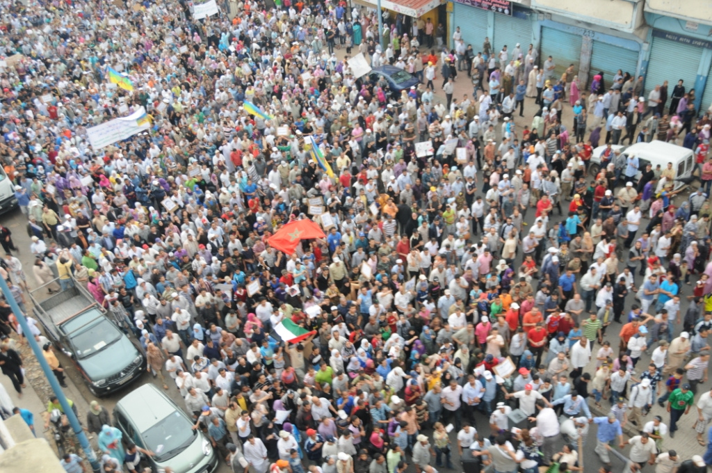 [Imrane Binoual] Young people turn out en masse to lobby for a role in the nation's future. خروج الشباب بكثافة للضغط من أجل الاضطلاع بدور لرسم مستقبل البلاد Les jeunes se rassemblent en masse pour demander à jouer un rôle dans l'avenir de leur pays.